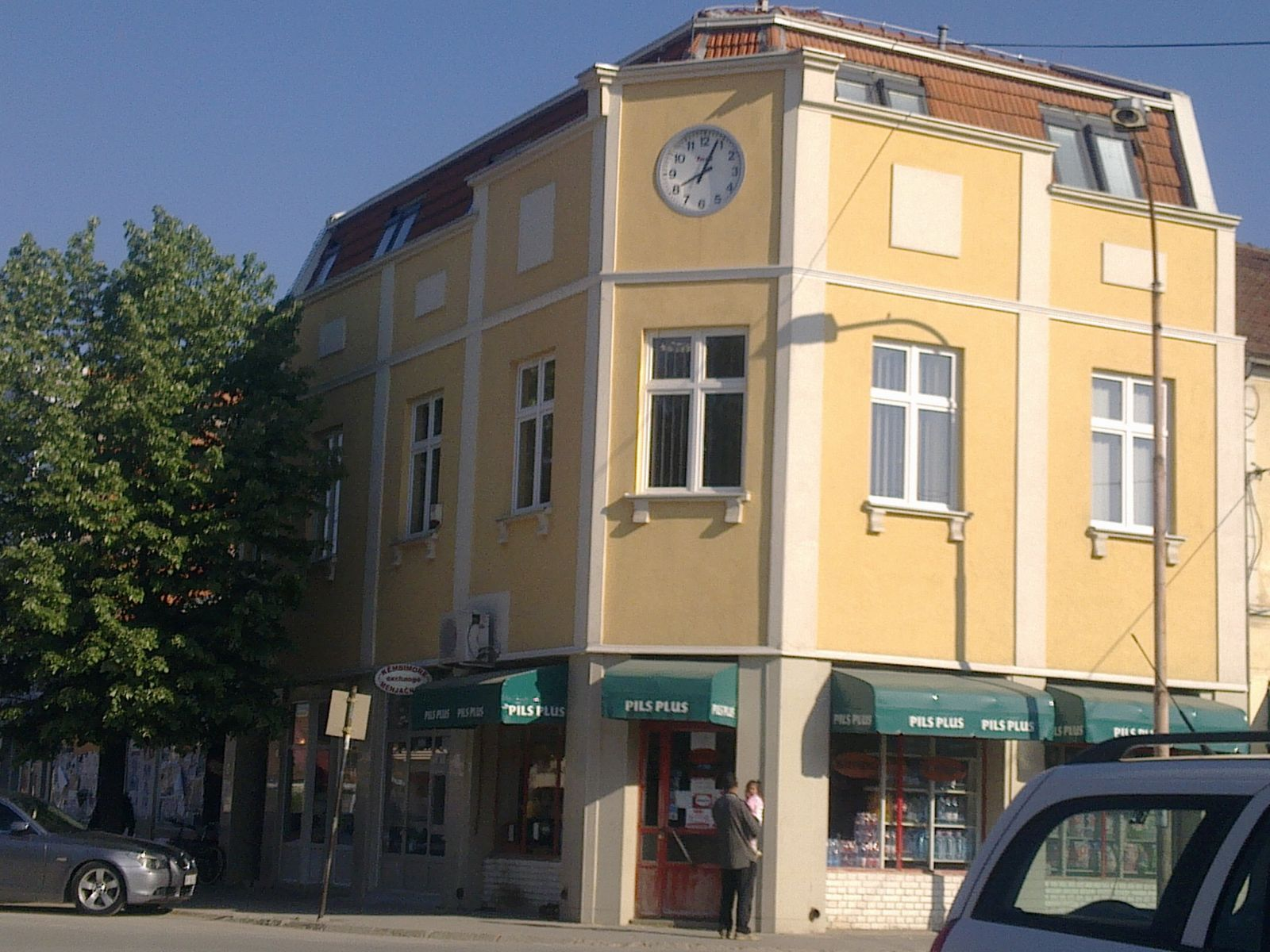 Bujanovc Qendra